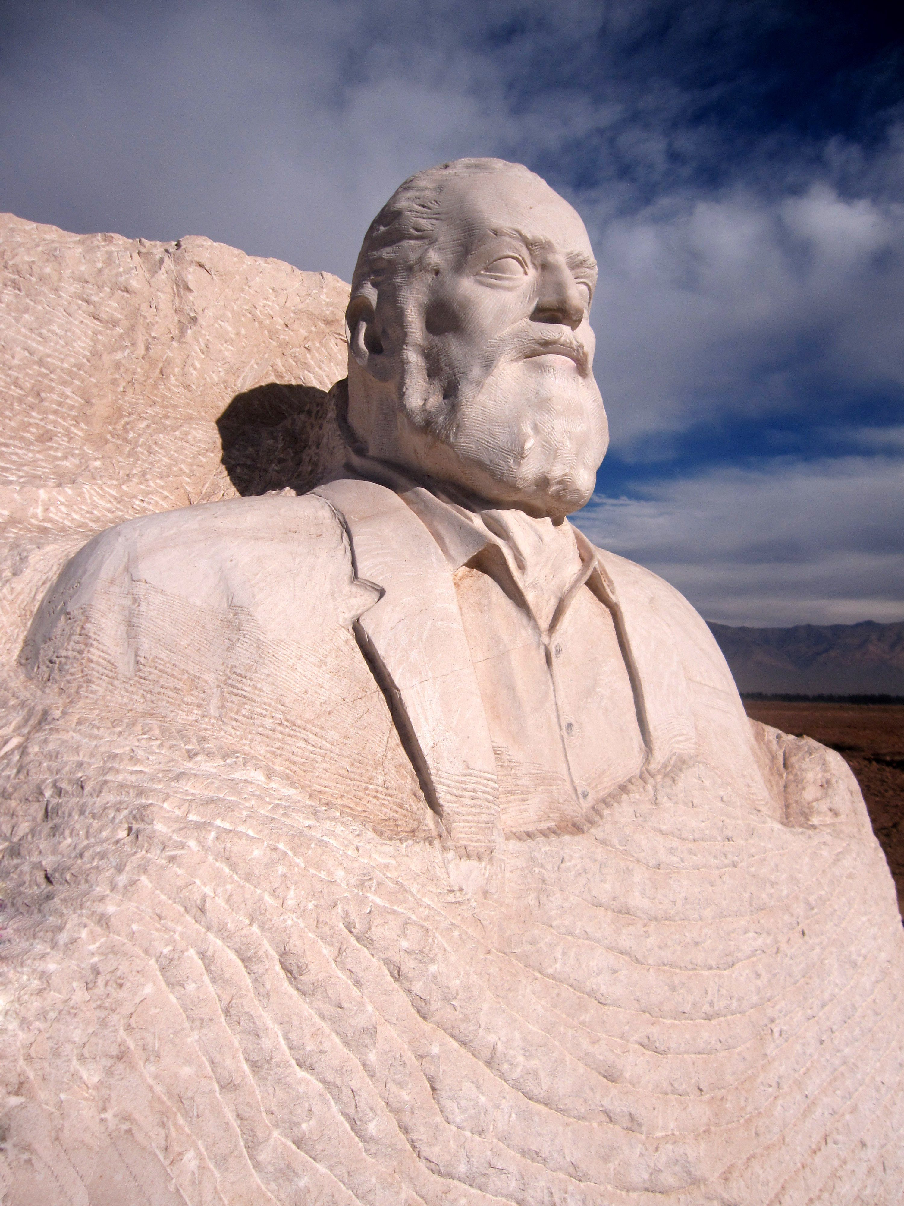 Parviz Meshkatian